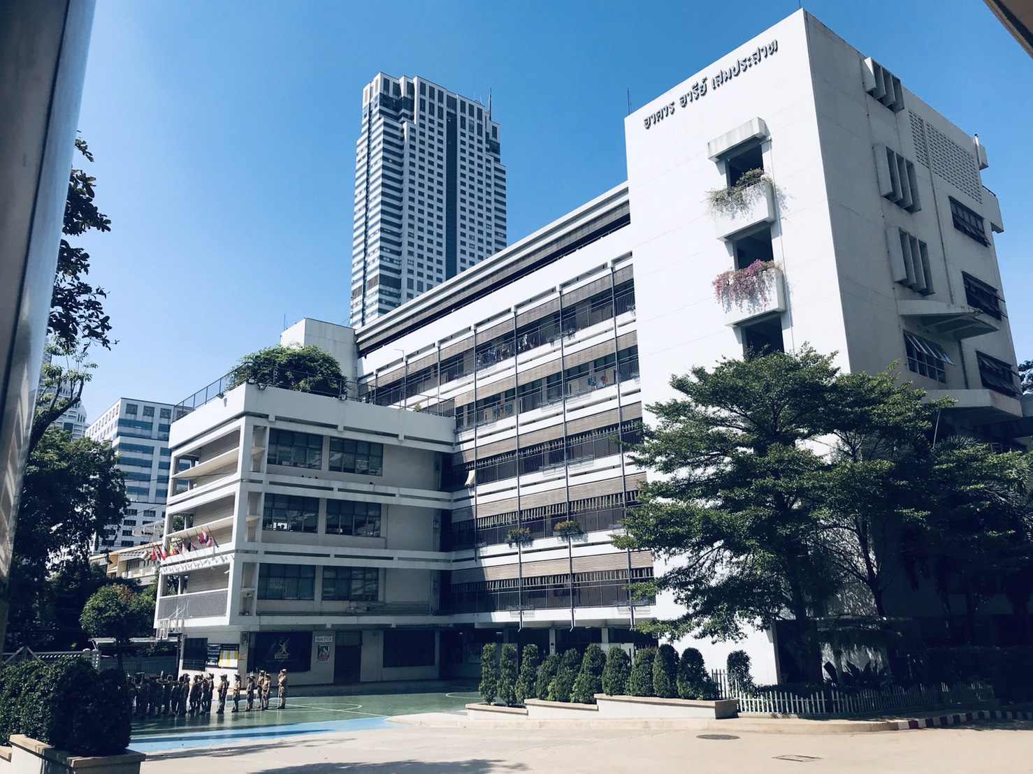 ภาพอาคารอารีย์ เสมประสาท ถ่ายเมื่อวันที่ 6 ธันวาคม 2562